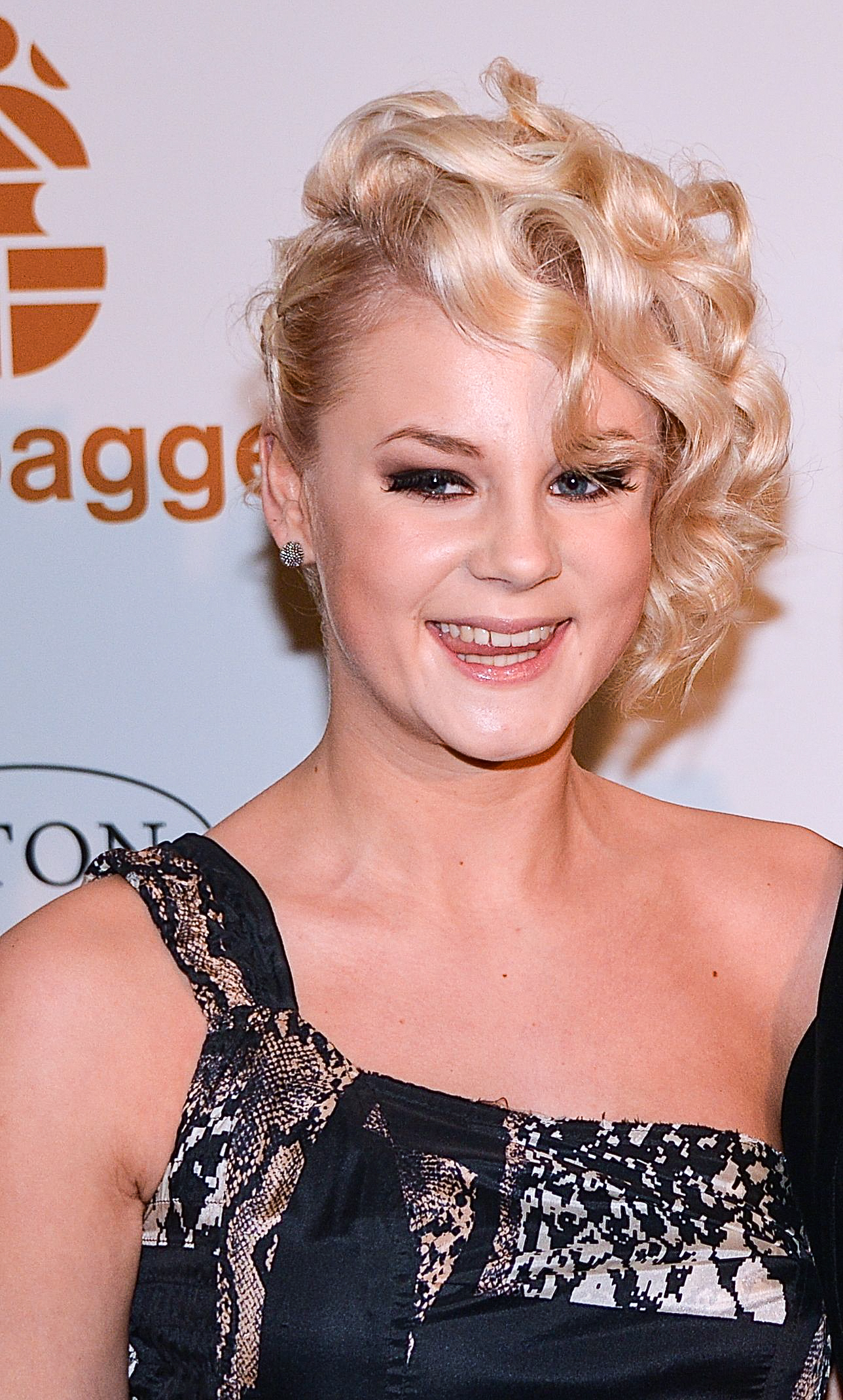 Molly Nutley på Guldbaggegalan 21 januari 2013.